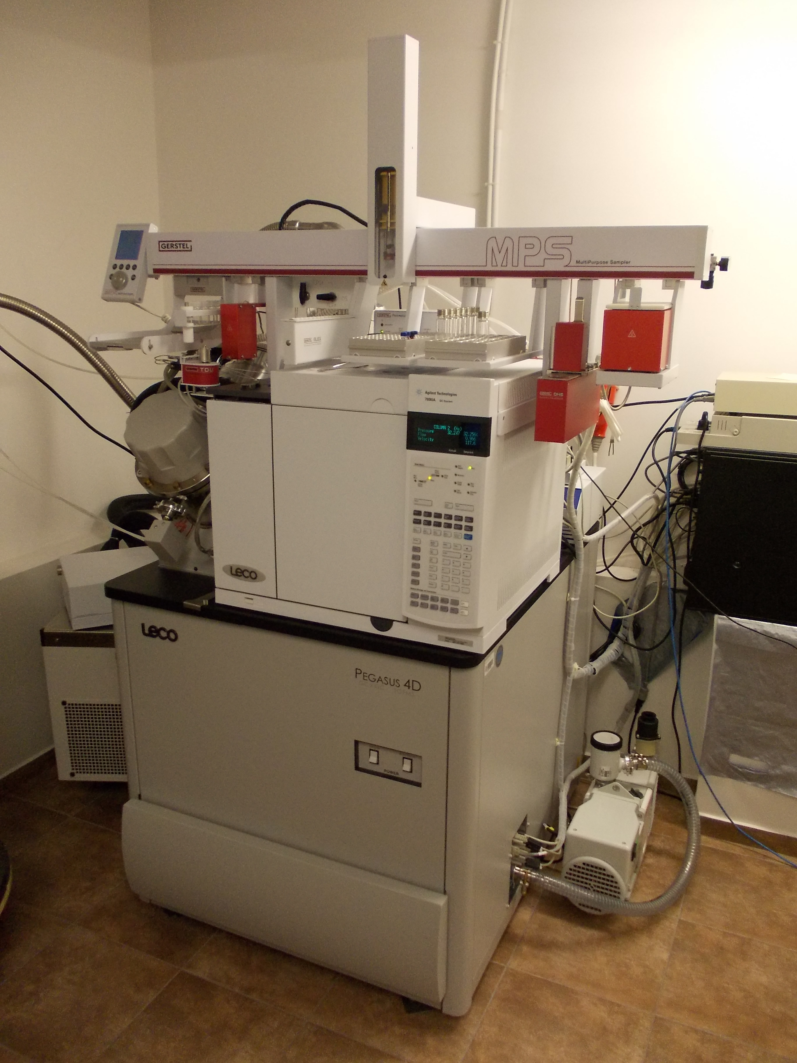 Najnowocześniejszy chromatograf gazowy w Polsce (2016). Dwuwymiarowy chromatograf gazowy umożliwia rozdzielanie złożonych mieszanin substancji chemicznych na postawie dwóch mechanizmów retencji oraz oznaczanie składników próbek na ultra śladowym poziomie stężeń.